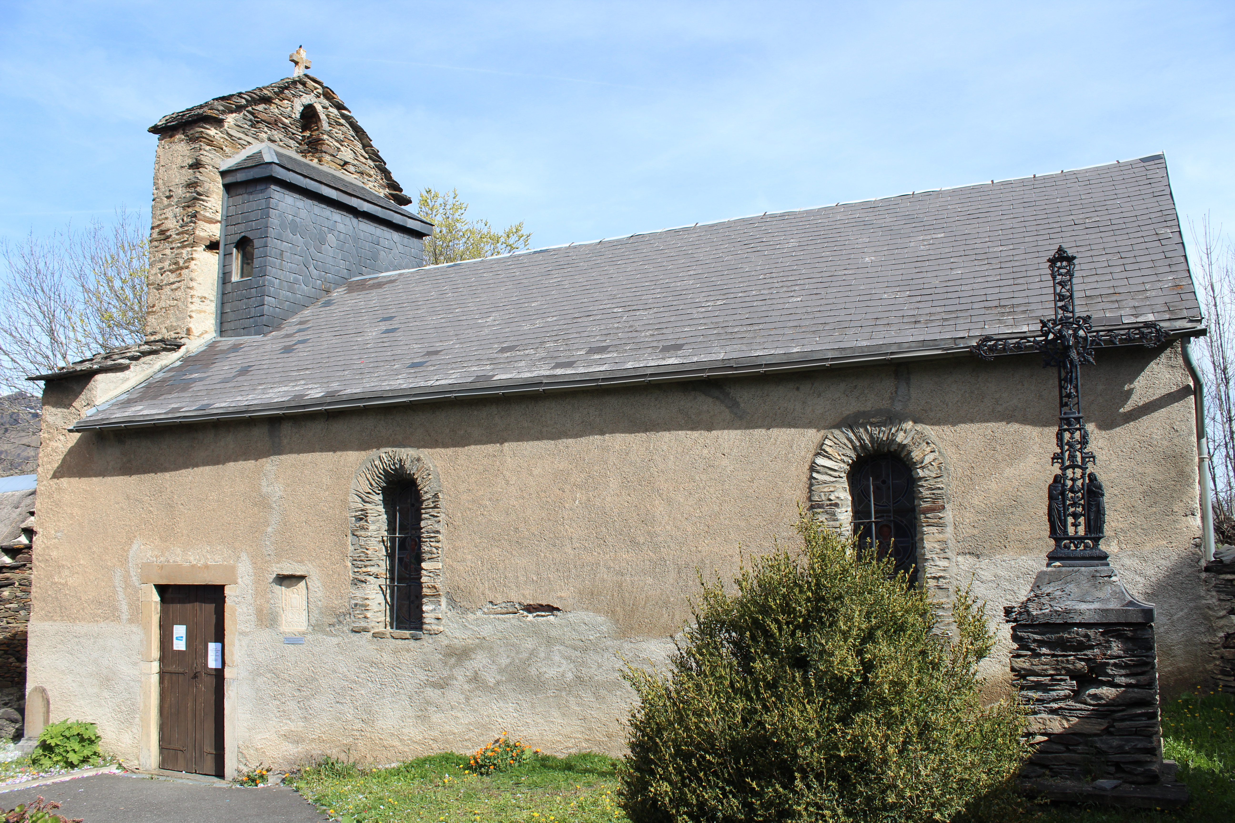 Église Saint-Pierre et Saint-Paul d'Artigue (Haute-Garonne, France), d'origine Romane, restaurée et rebâtie en 1799.